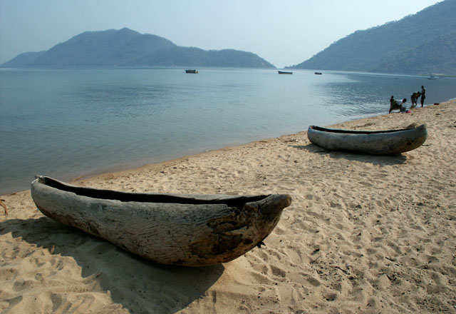 Typische Einbaum-Kanus, wie sie am Malawisee häufig verwendet werden. Ort: Monkey Bay am Südufer des Malawisees